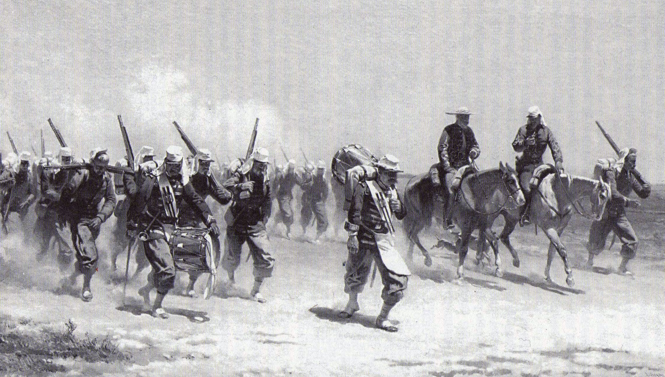 légion belge au Mexique. Tableau de Lahalle